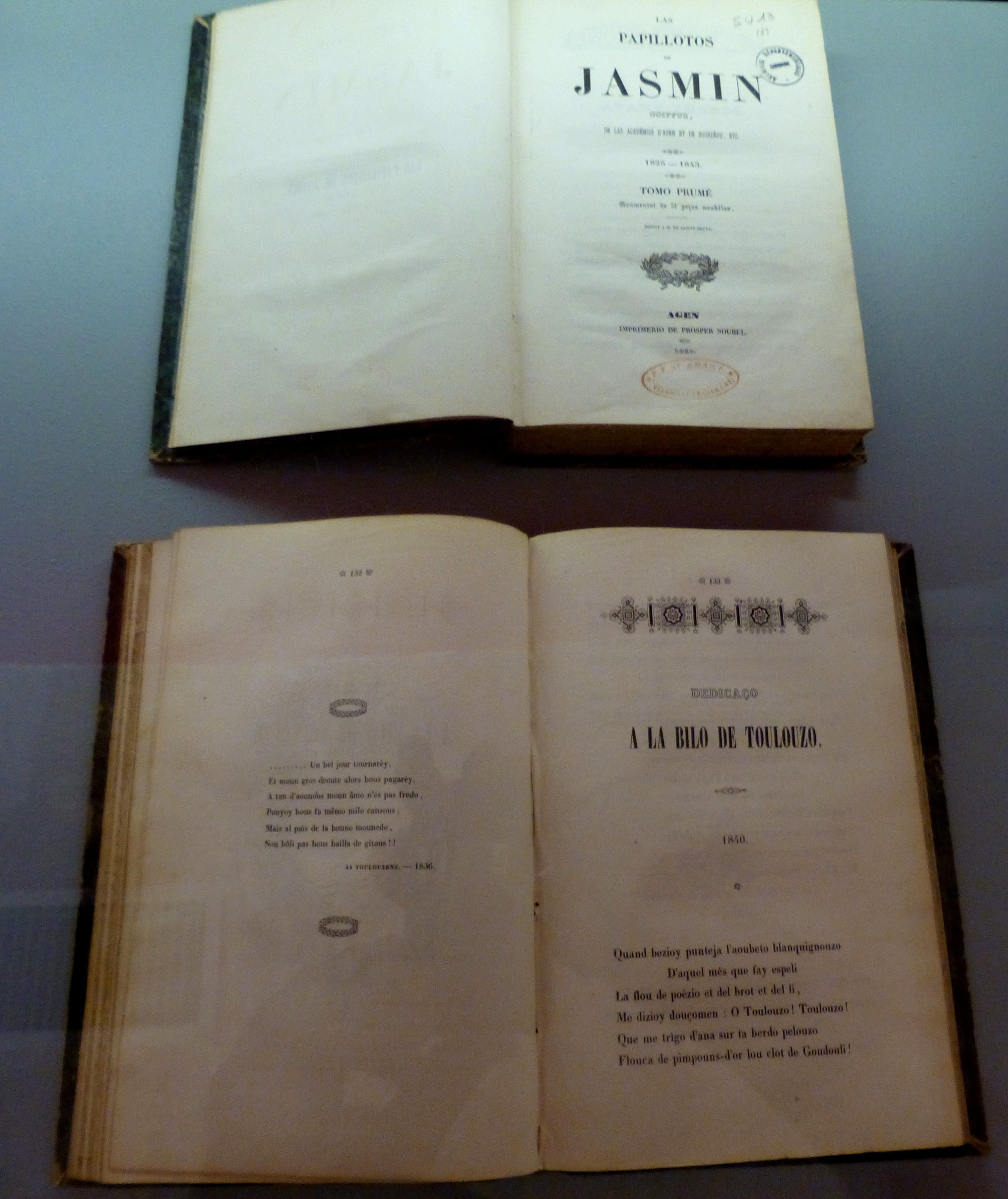 Bordeaux, Archives départementales de la Girondeː Las Papillotos, tomo prumé de Jasmin, 1843. A la bilo de Toulouzo, 1840